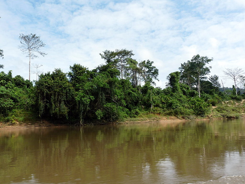 Taman Negara (Park Narodowy Malezji)